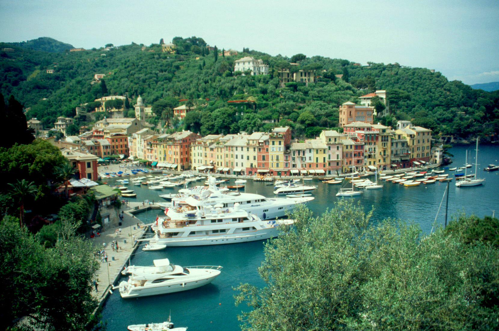 Portofino 2004